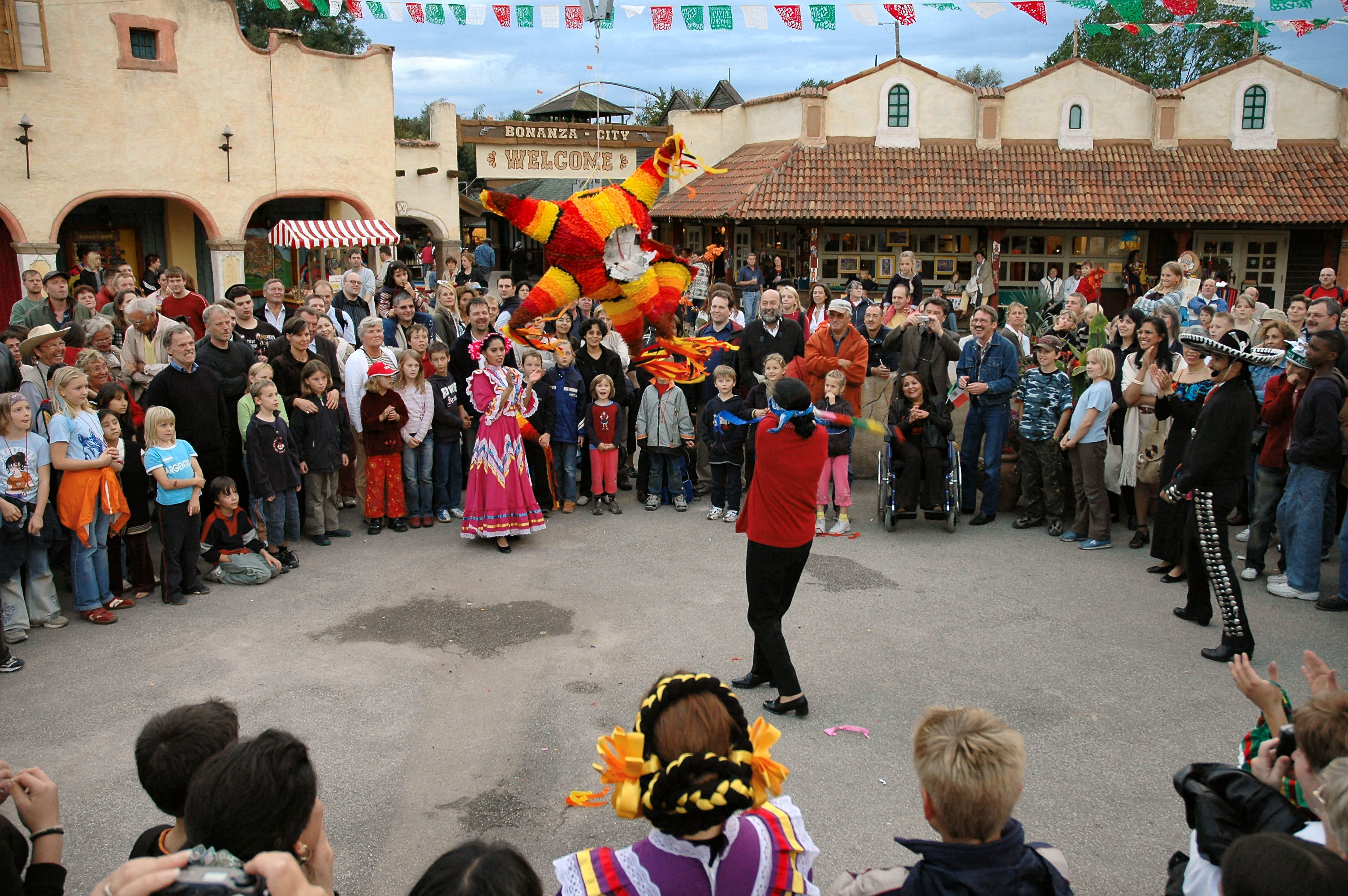 Piñata, El Día De México (en Alemania)